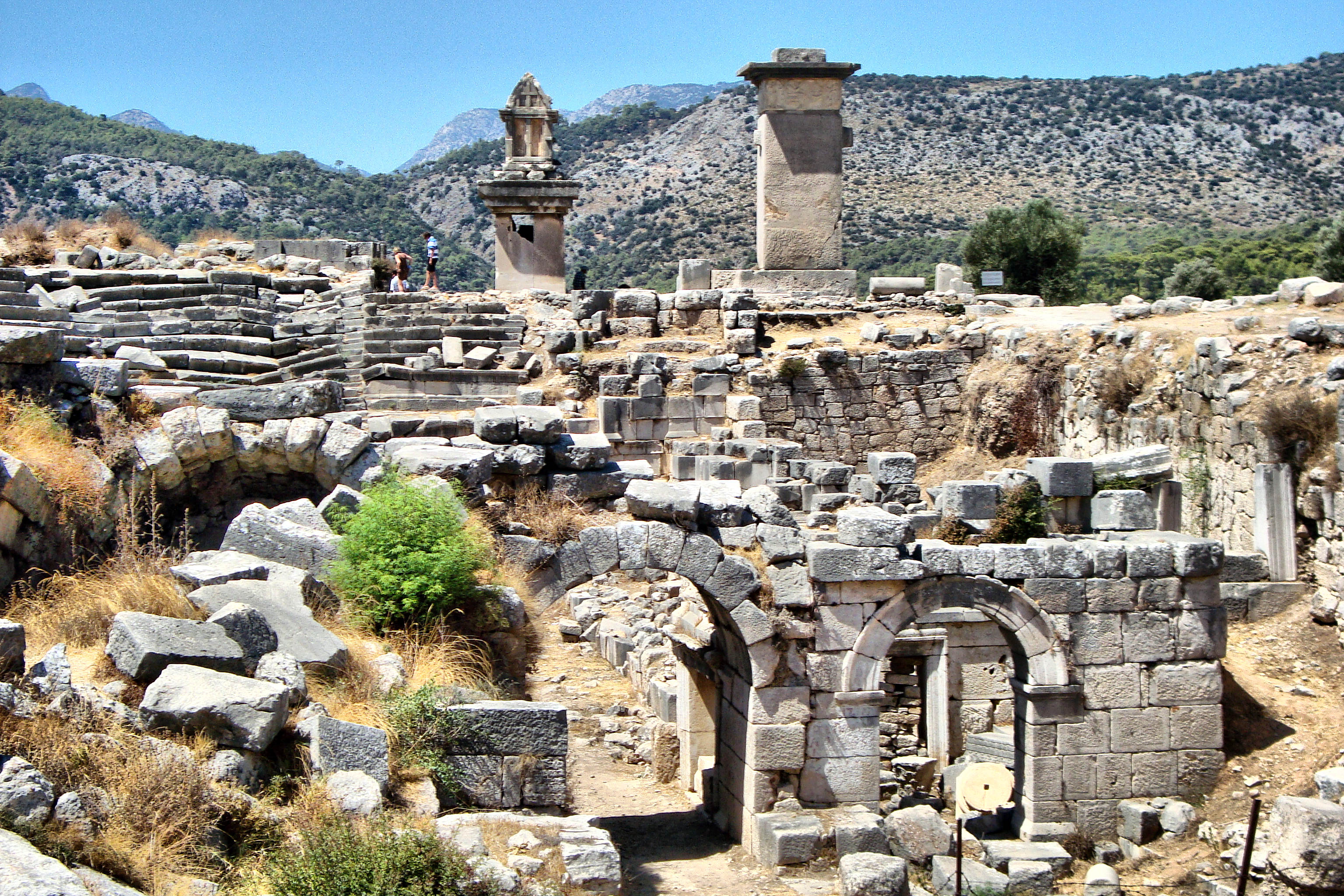 XANTHOS-TURKEY